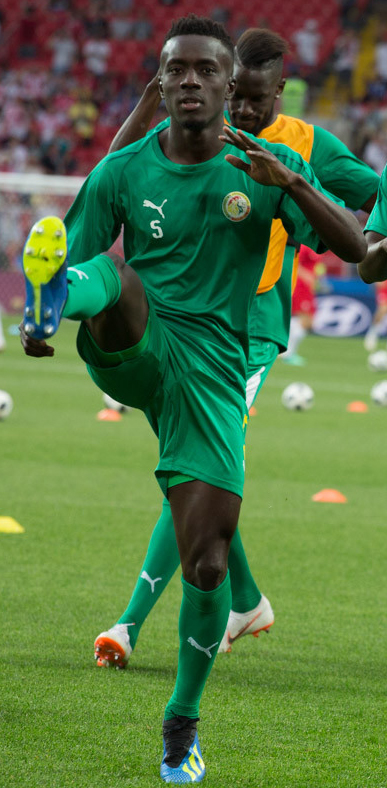 Польша неожиданно проиграла Сенегалу